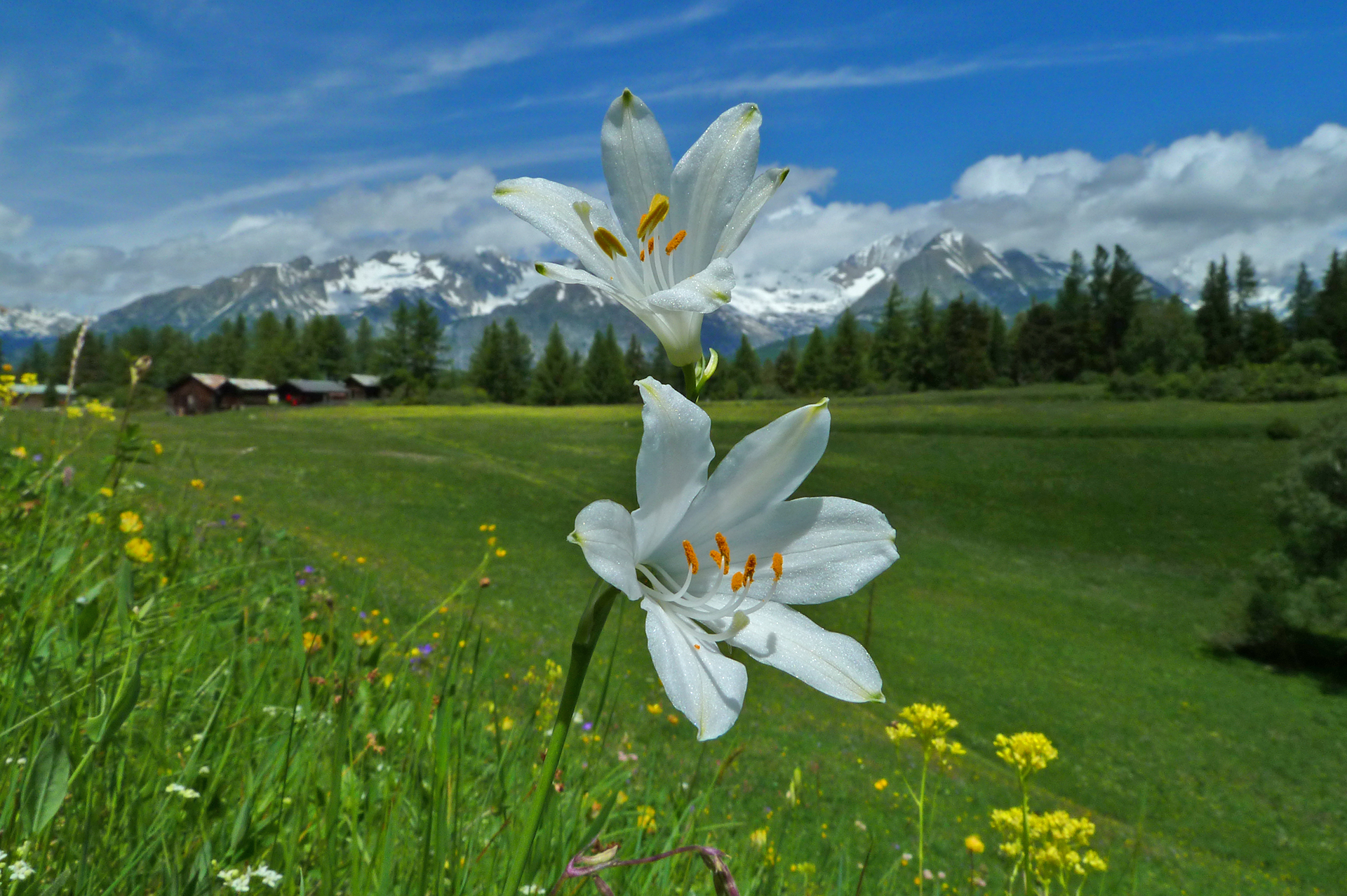 Magerwiese mit Paradieslilie in der mittleren Hellela (Zeneggen)